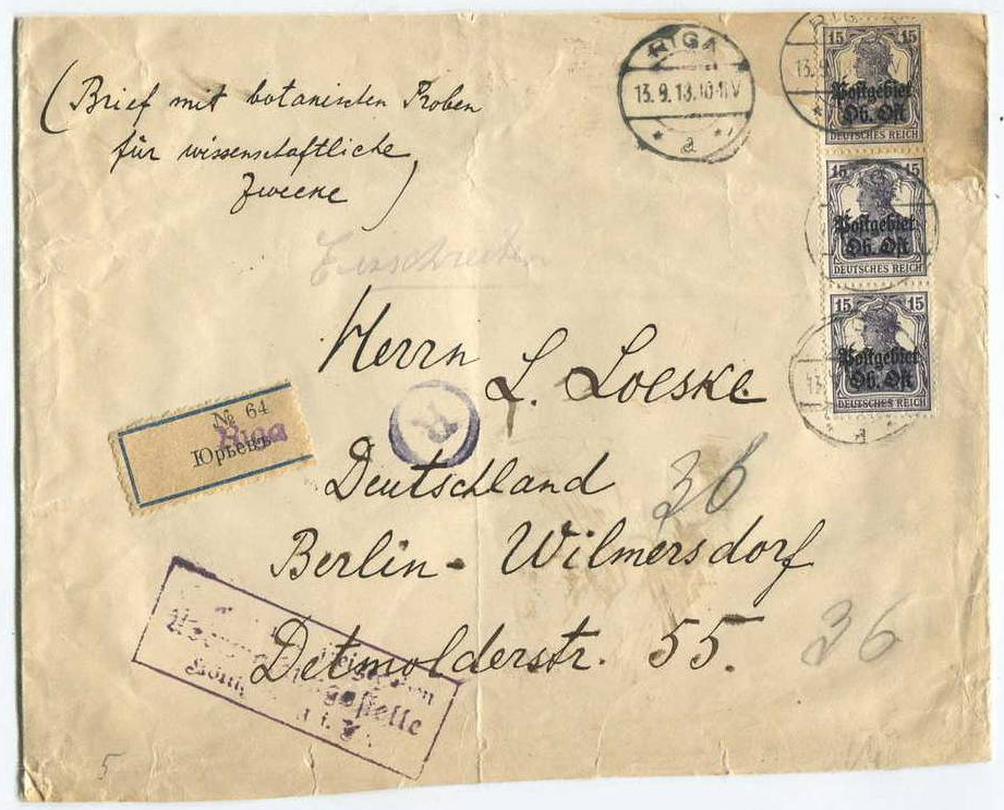 Почтовый конверт, отправленный из Риги в Берлин в 1918 году, франкированный марками Почтовой зоны Верховного главнокомандующего на Востоке (Postgebiet / Ob. Ost)